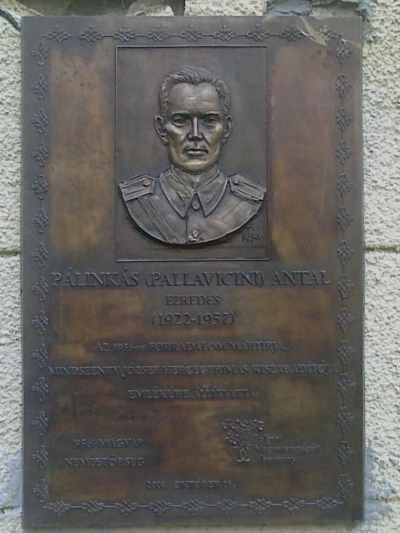 Pálinkás Antal (szül. Pallavicini Antal őrgróf) emléktáblája Felsőpetényen az Almássy-kastély oldalában.